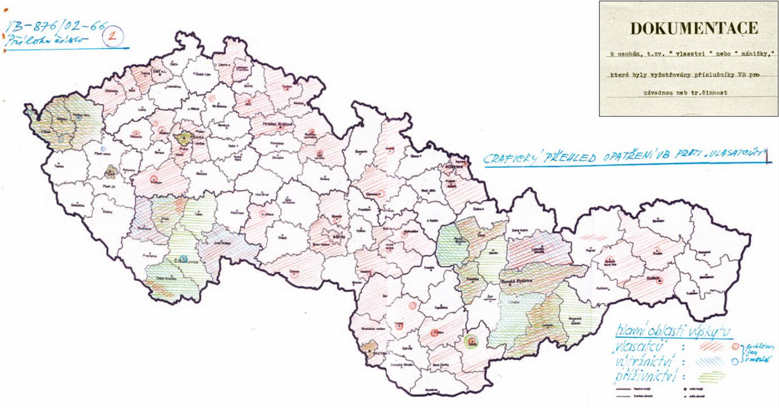 Mapa vlasatců, výtržníků a příživníků, kteří byli vyšetřováni Veřejnou bezpečností, Ministerstvo vnitra ČSSR, 1966.